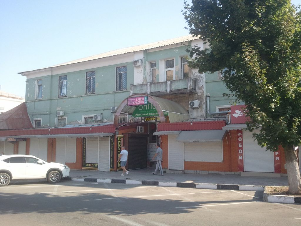 Здание бывшей амбулатории им. Н.А. Арендта. №42 по ул. Пушкина. До 2000-х сохраняла медицинский профиль использования.